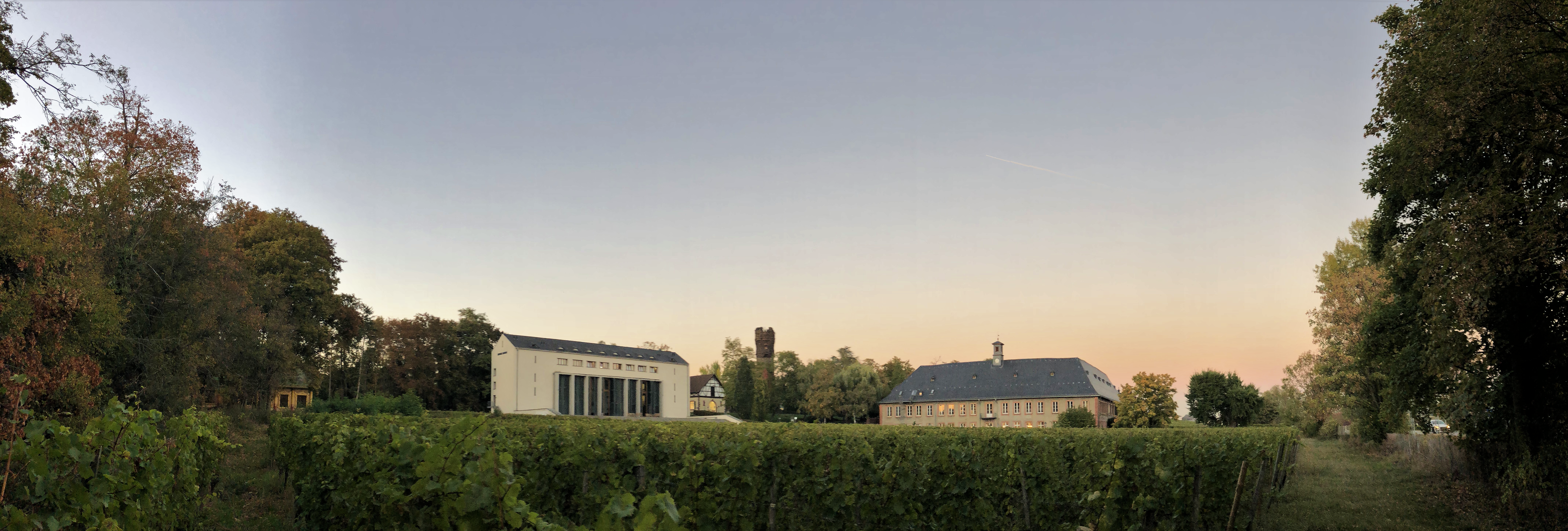 Schloss Reichartshausen Panorama